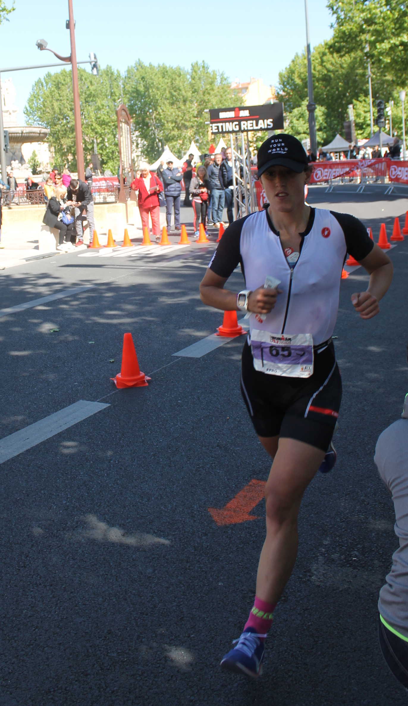 India Lee IMPA 2019